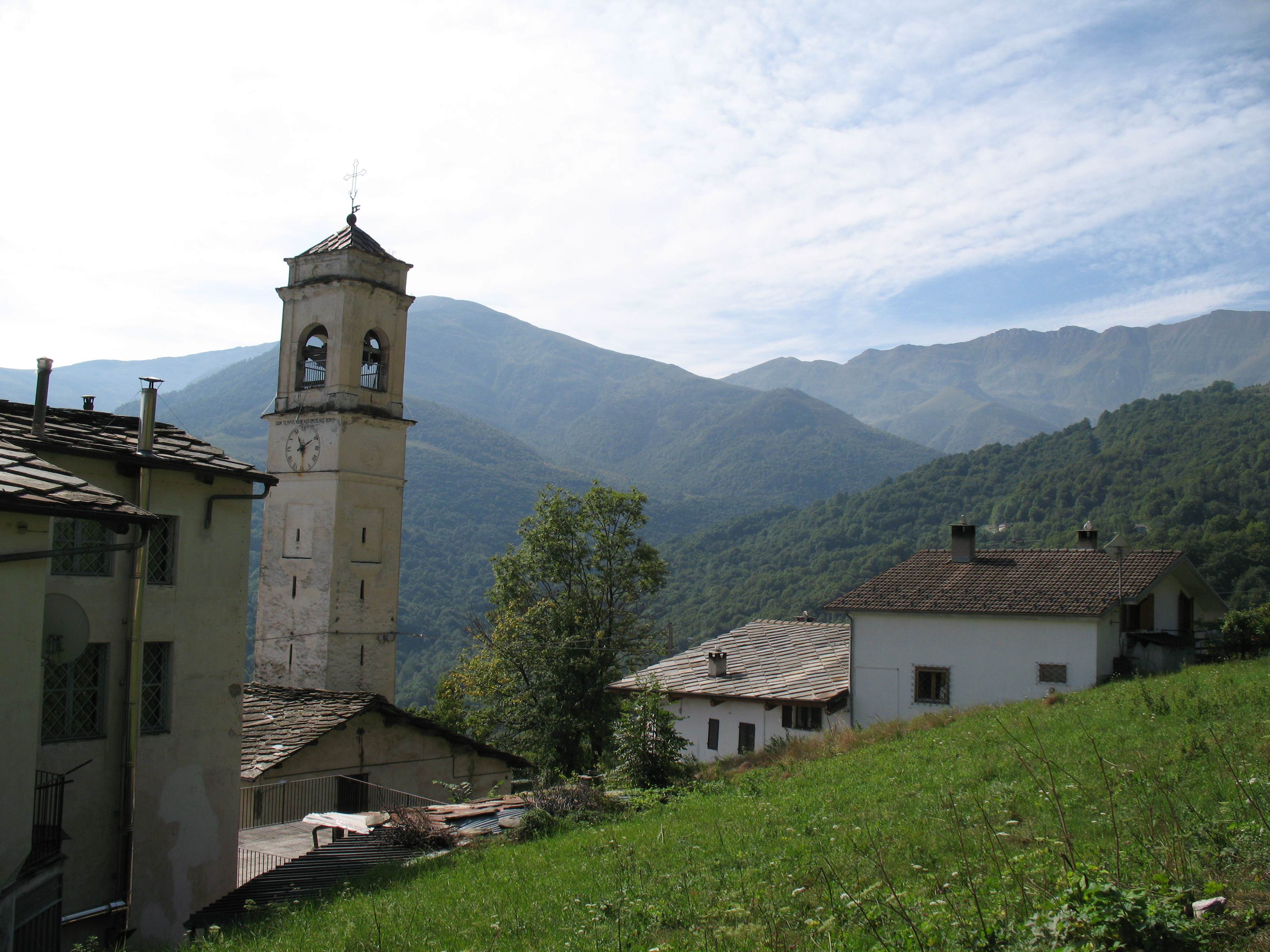 Campanile delle chiesa di Oncino